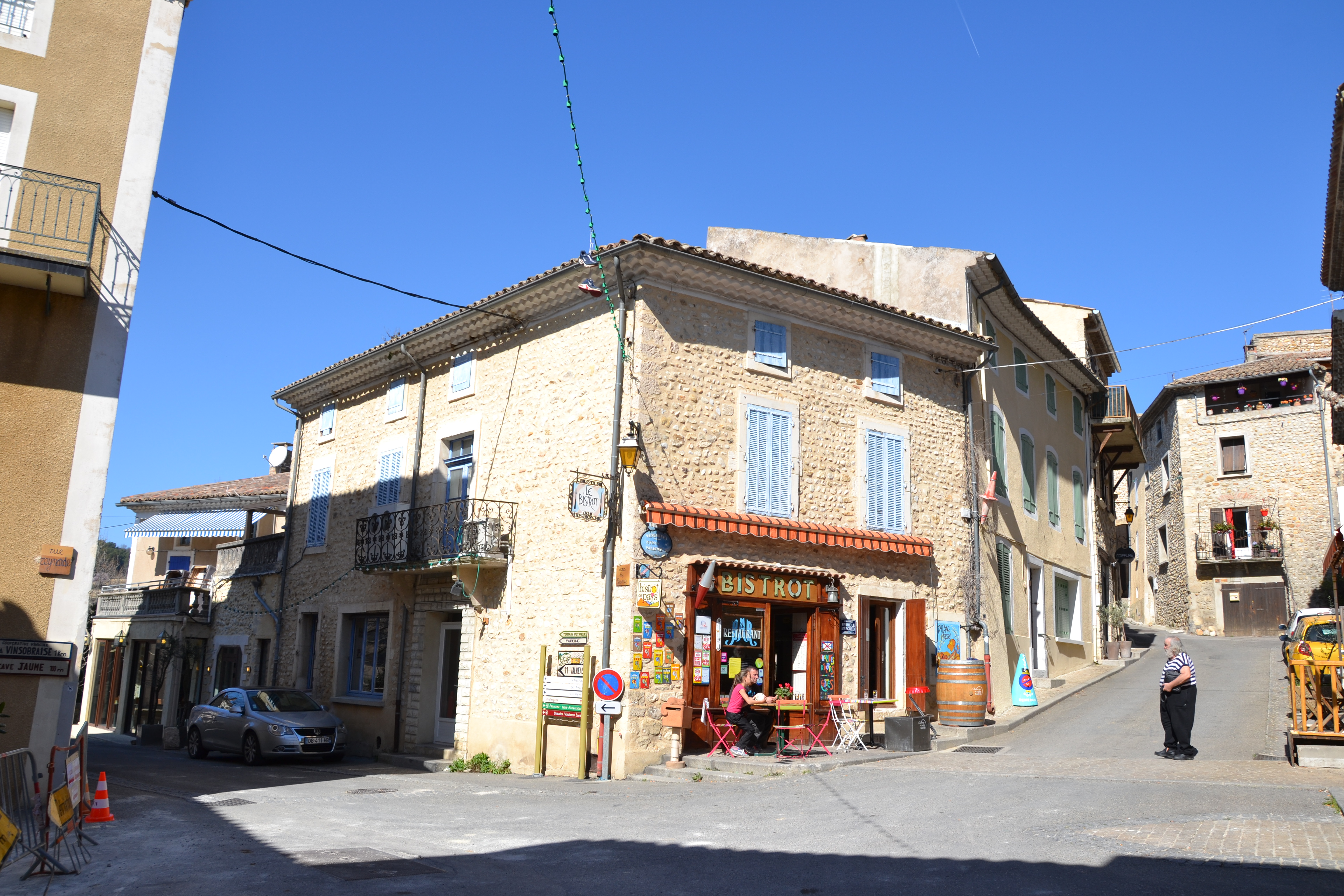 bistrot de Pays de Vinsobres (26)